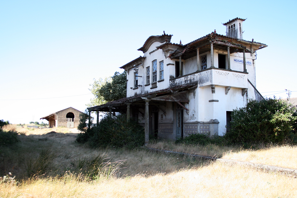 C. F. de Mogadouro (desactivada)